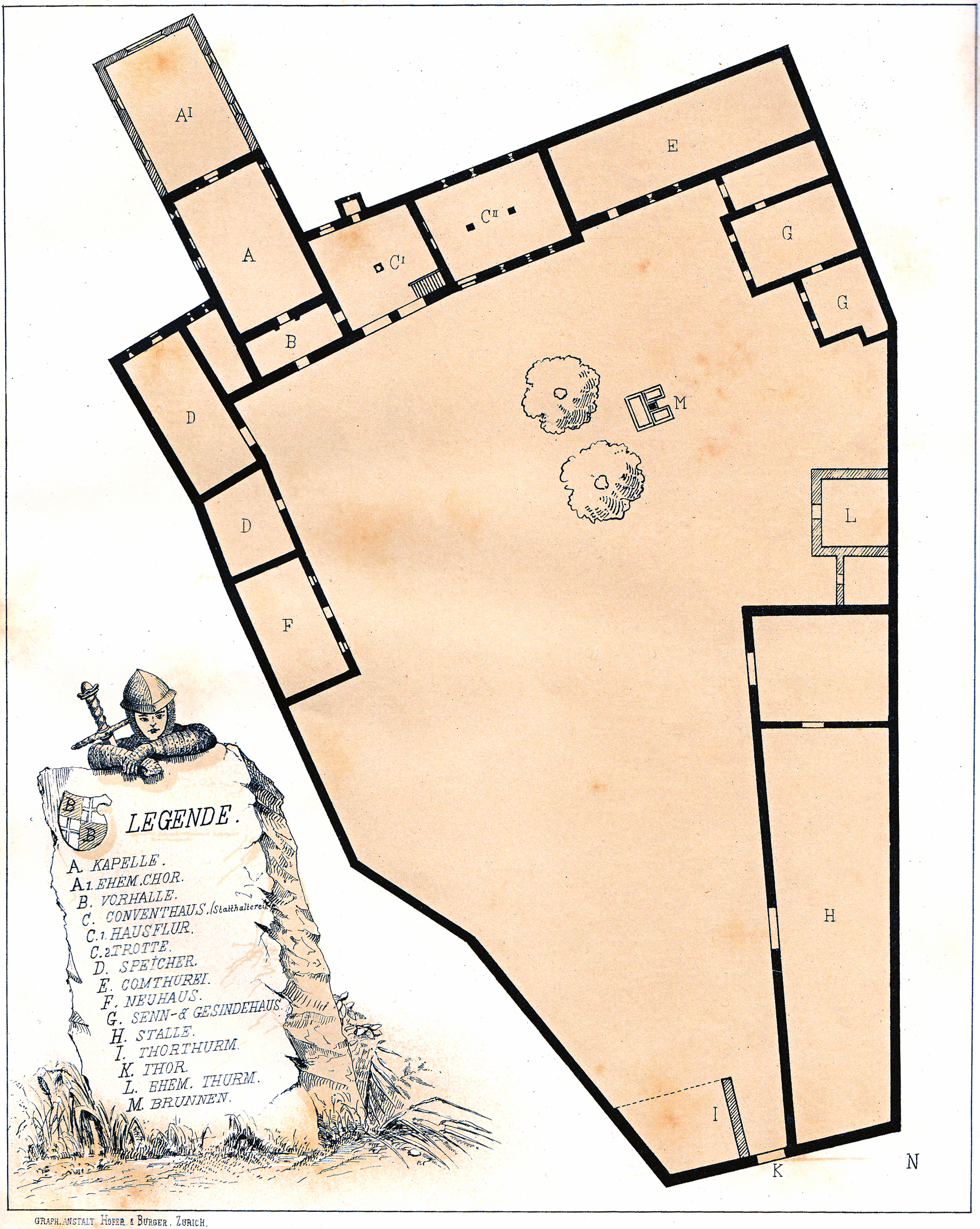 Grundriss der Gebäude des Ritterhauses Bubikon vor 1789 im Massstab 1:500. Nach Zeller-Werdmüller 1885 gezeichnet von Architekt Albert Gull